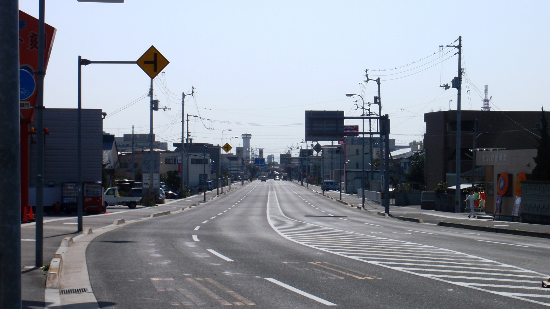 香川県高松市の市道木太鬼無線。西ハゼ町付近。